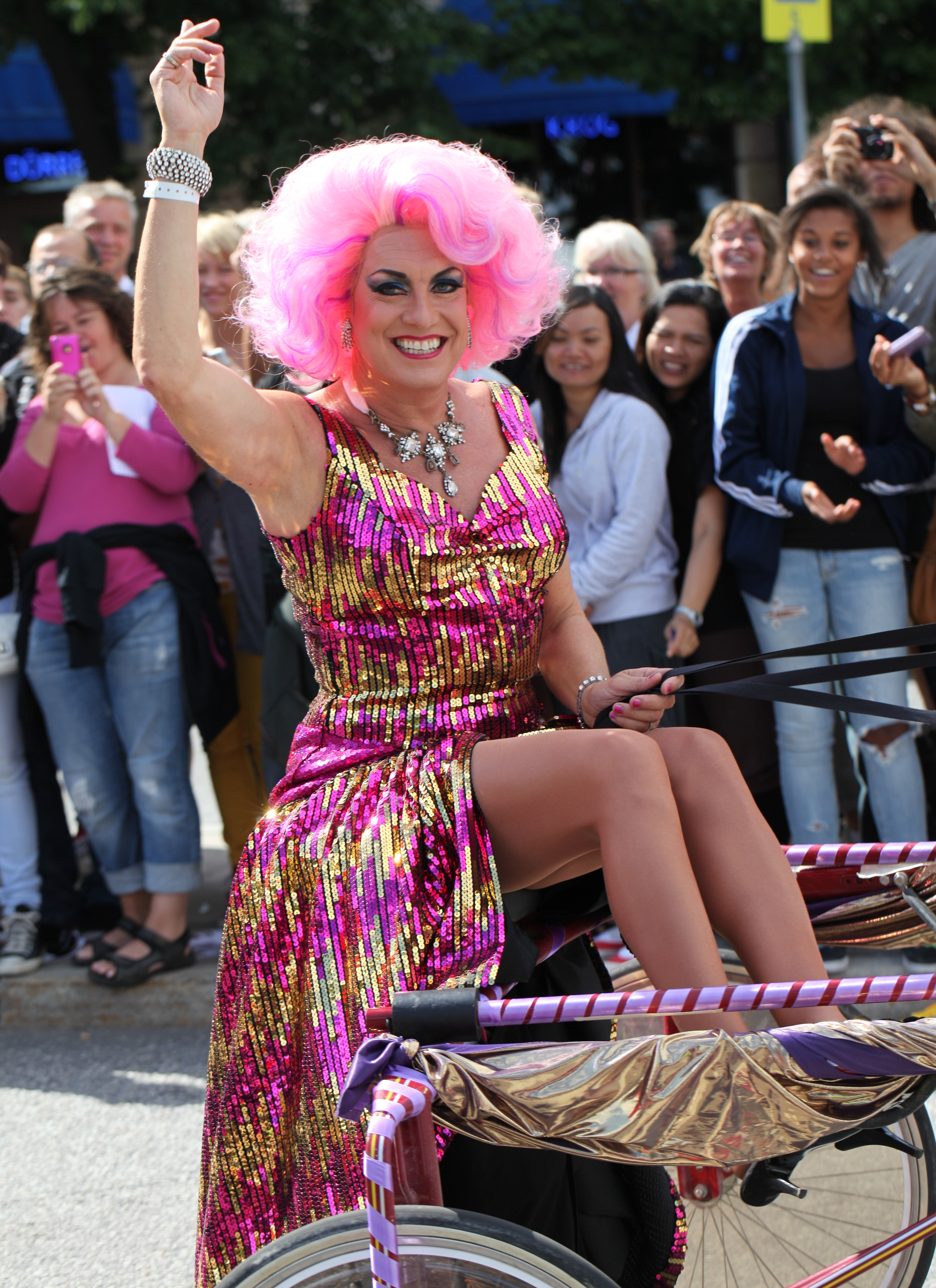 Babsan at Pride 2010.